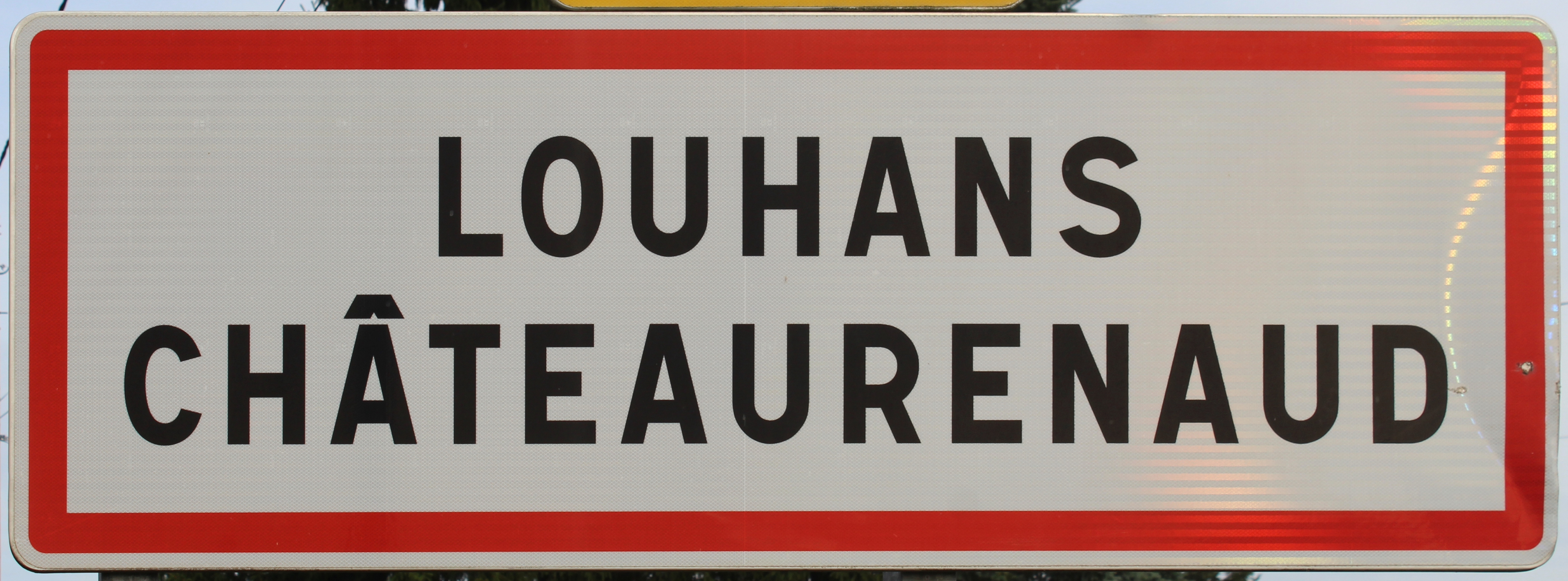 Panneau d'entrée dans Louhans-Châteaurenaud, nom non officiel de Louhans.